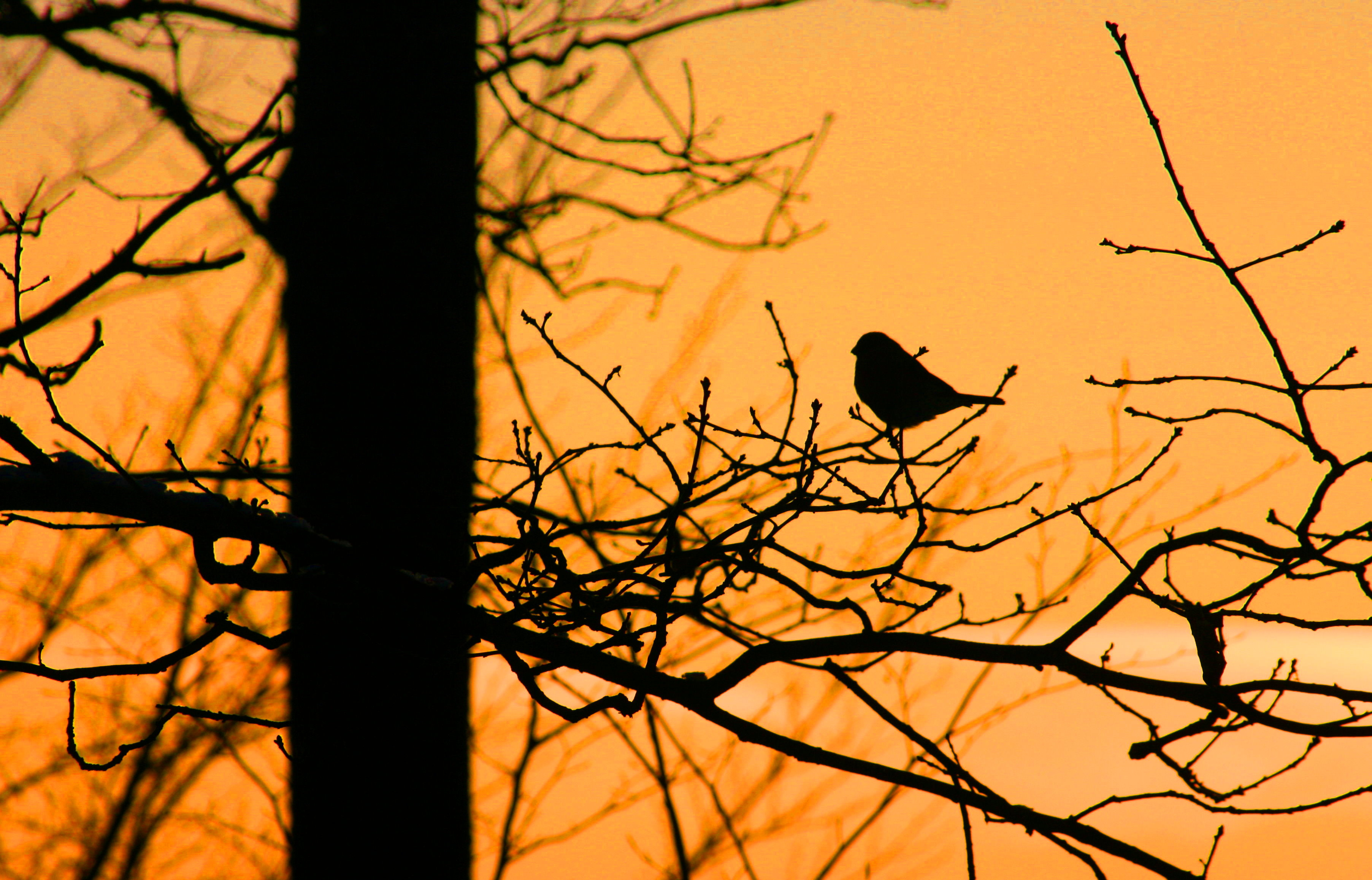 Dompfaff im Sonnenuntergang FFH Gebiet Hessen: 5215-305 Krombachswiesen und Struth bei Sechshelden